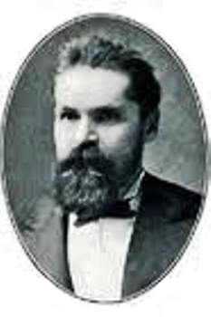 Lojka Hugó zuzmókutató (lichenológus), tanár.